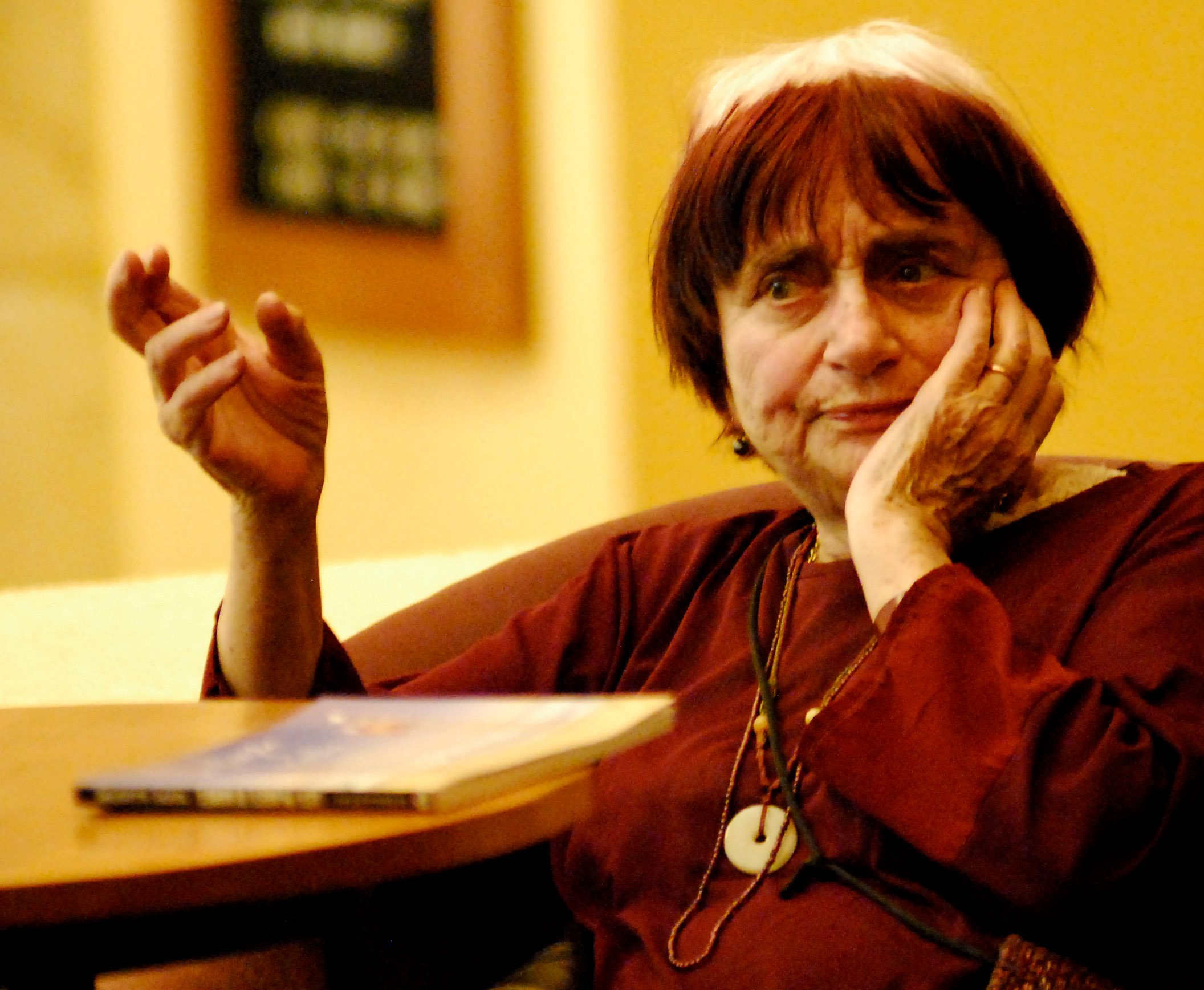 18.03.10 Agès Varda y Jorge Sánchez Sosa en una charla privada en el lobby del Hotel Fiesta Americana. © Cortesía de FICG 25 / Oscar Delgado